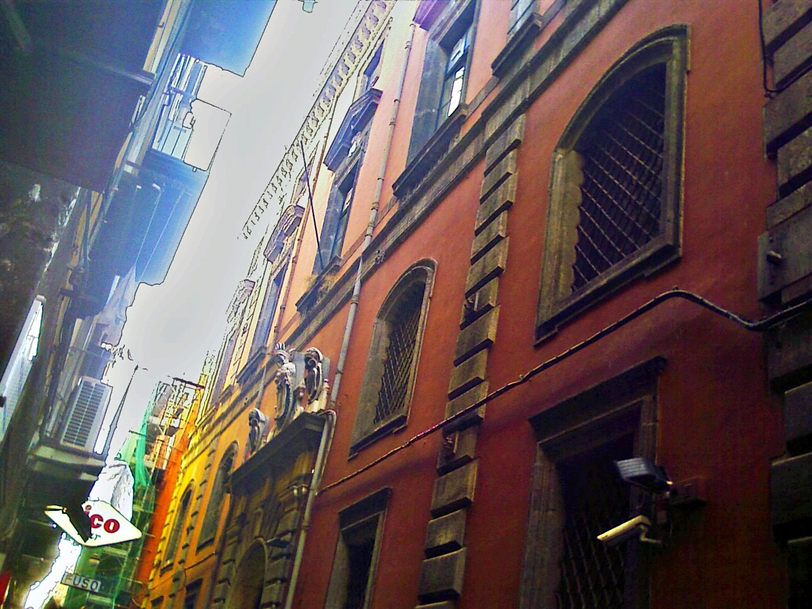 Facciata esterna